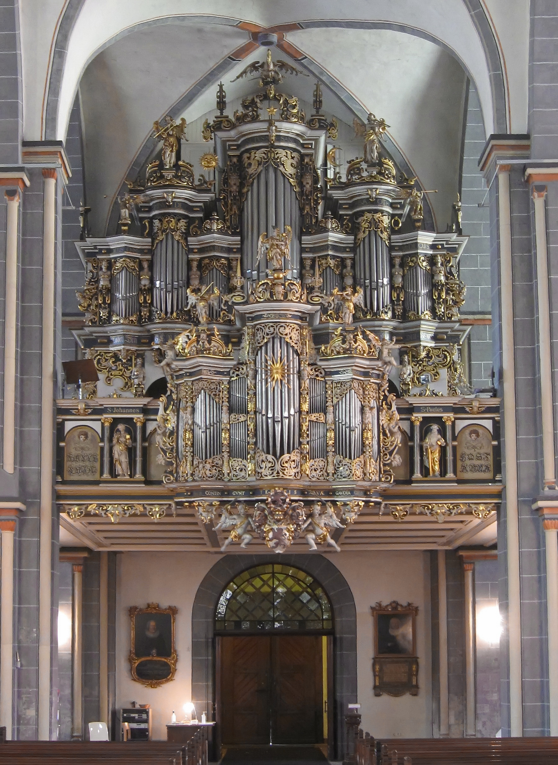 St. Martinikirche zu Braunschweig, An der Martinikirche 10 in Braunschweig. Das zweiteilige Orgelprospekt, das von Jonas Weigel in den Jahren 1630 bis 1631 erschaffen wurde, überstand den Zweiten Weltkrieg unbeschadet, da es vor dem Bombenangriff auf Braunschweig (1944) aus der Kirche entfernt und an einen anderen Ort verbracht wurde. Das Pfeifenwerk wurde durch Bomben zerstört.